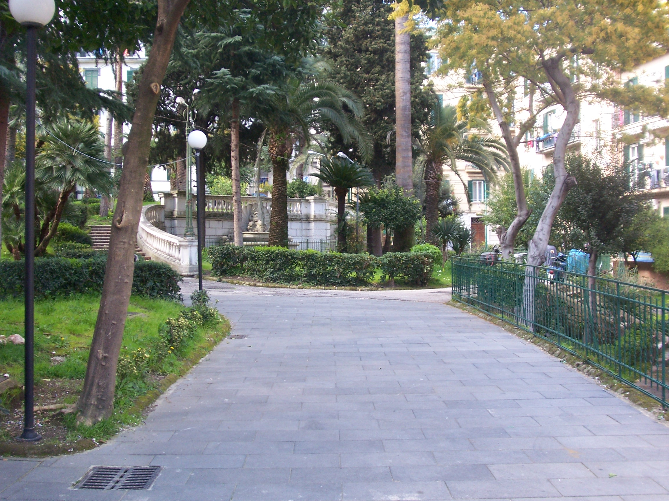 Rione Materdei: giardino di un condominio (via Leone Marsicano n° 2)